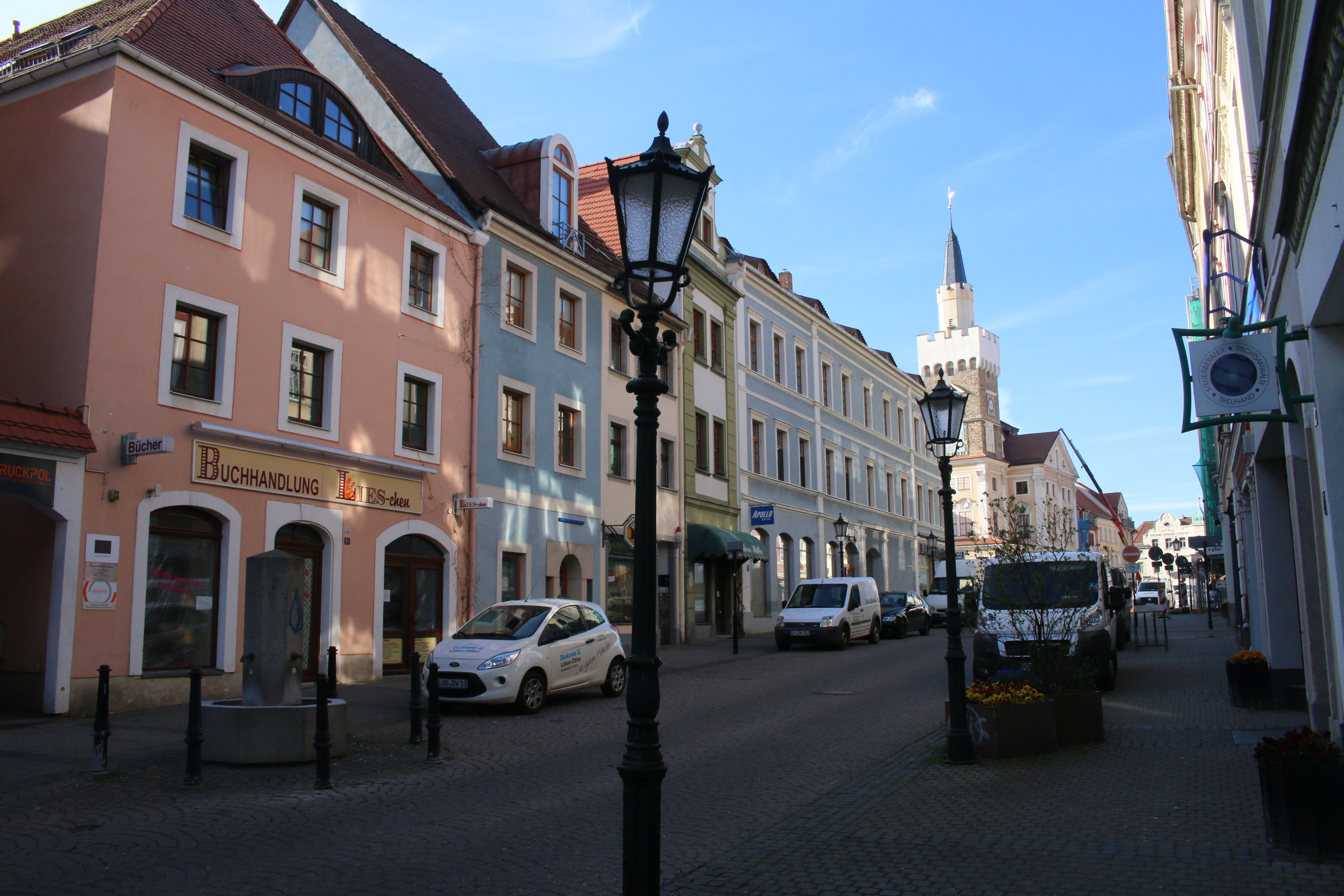 Innere Zittauer Straße in Löabu; Blick Richtung Atmarkt; Fotoposition auf Höhe der Inneren Zittauer Straße 7